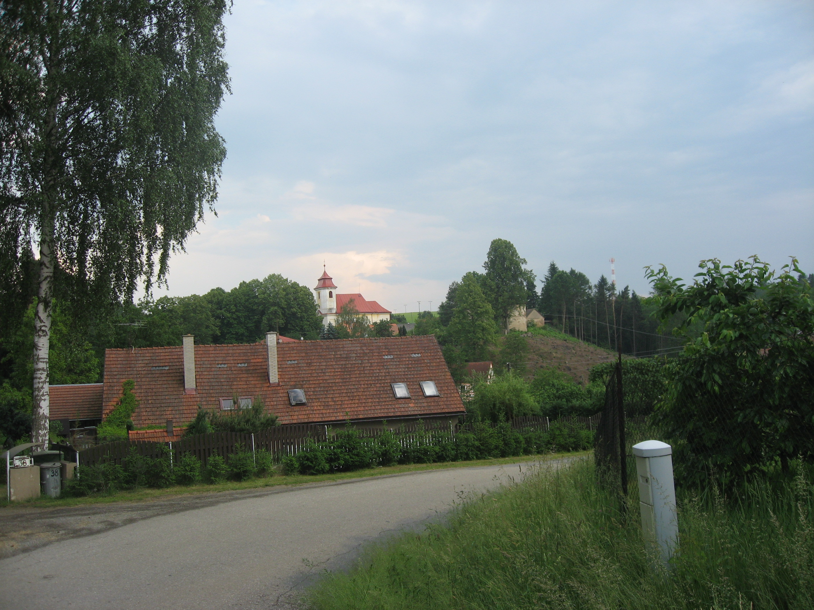 Skála, součást obce Věž